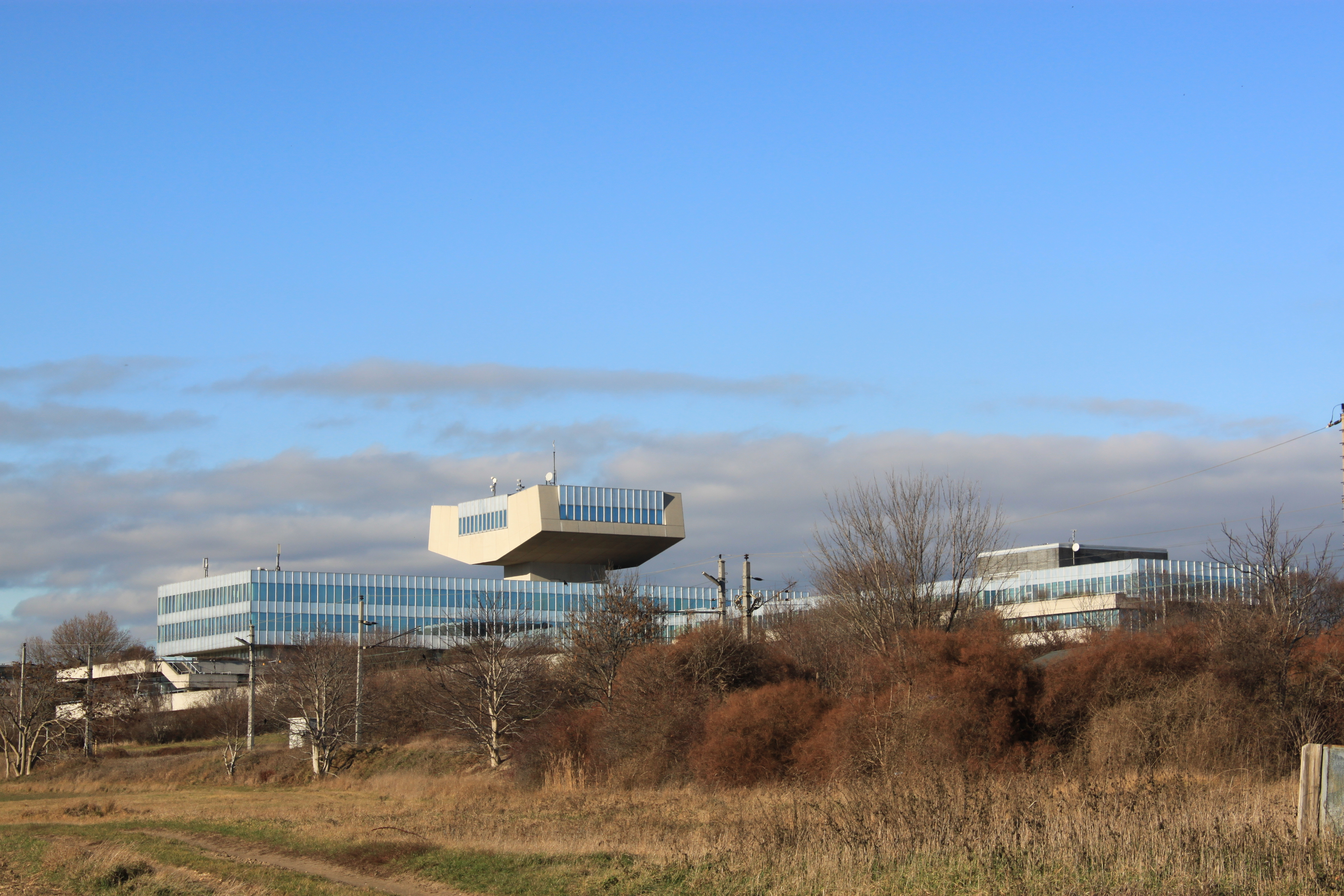 Ehemaliges AUA-Gebäude in Oberlaa, Wien X.